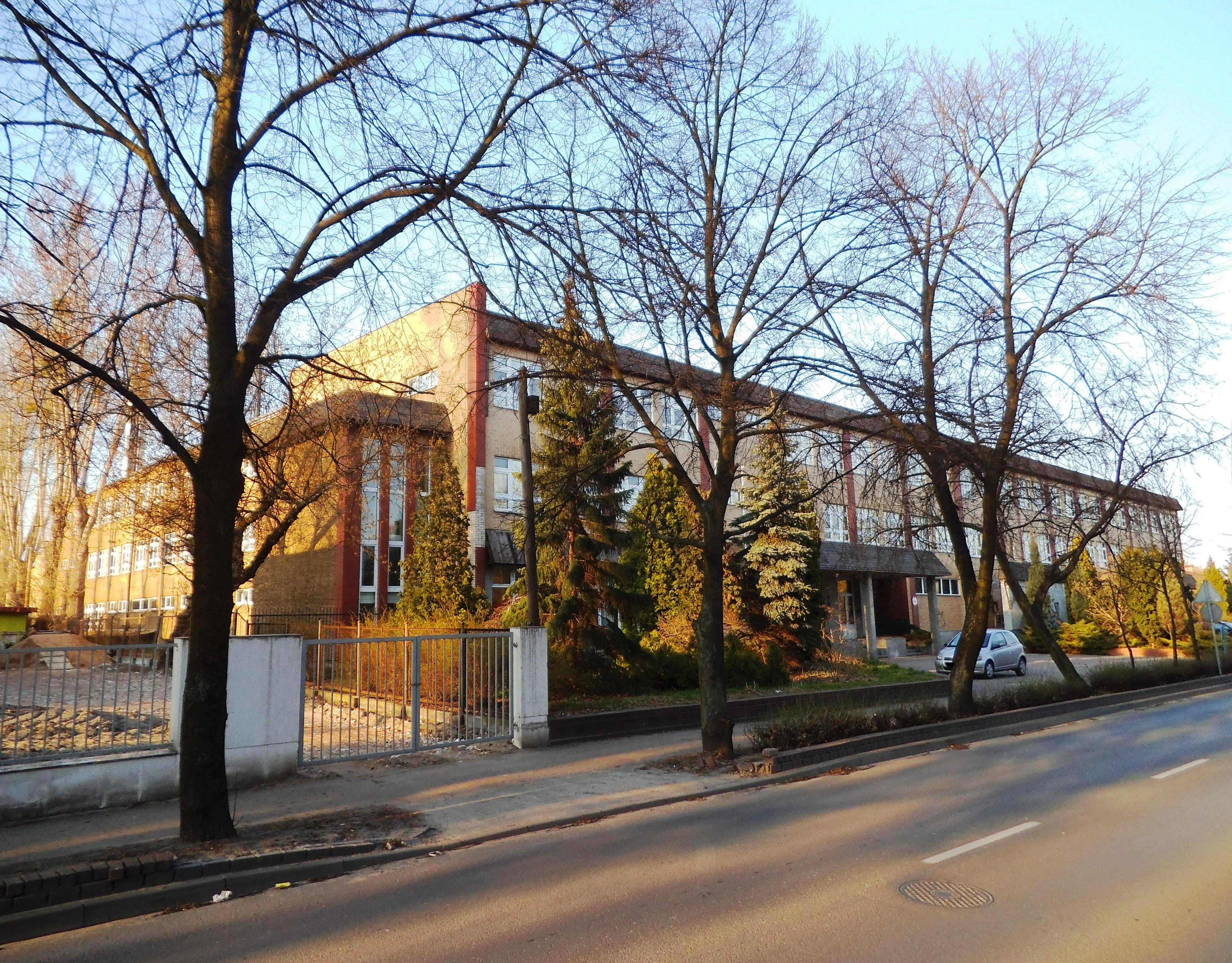 Torpo w Toruniu22